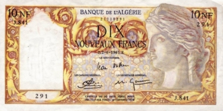 Francia Algéria 10 új frank 1960.07.29. Mérete: 185 X 93 mm.